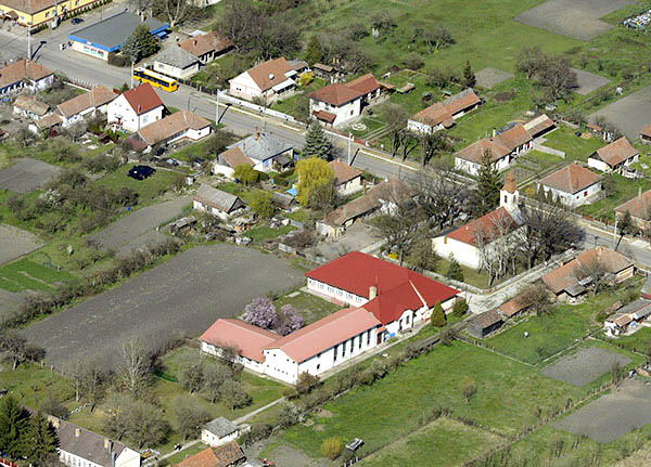 Légi fotó Tiszagyulaházáról